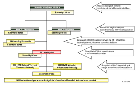 HM Vezérkar szervezeti diagramja